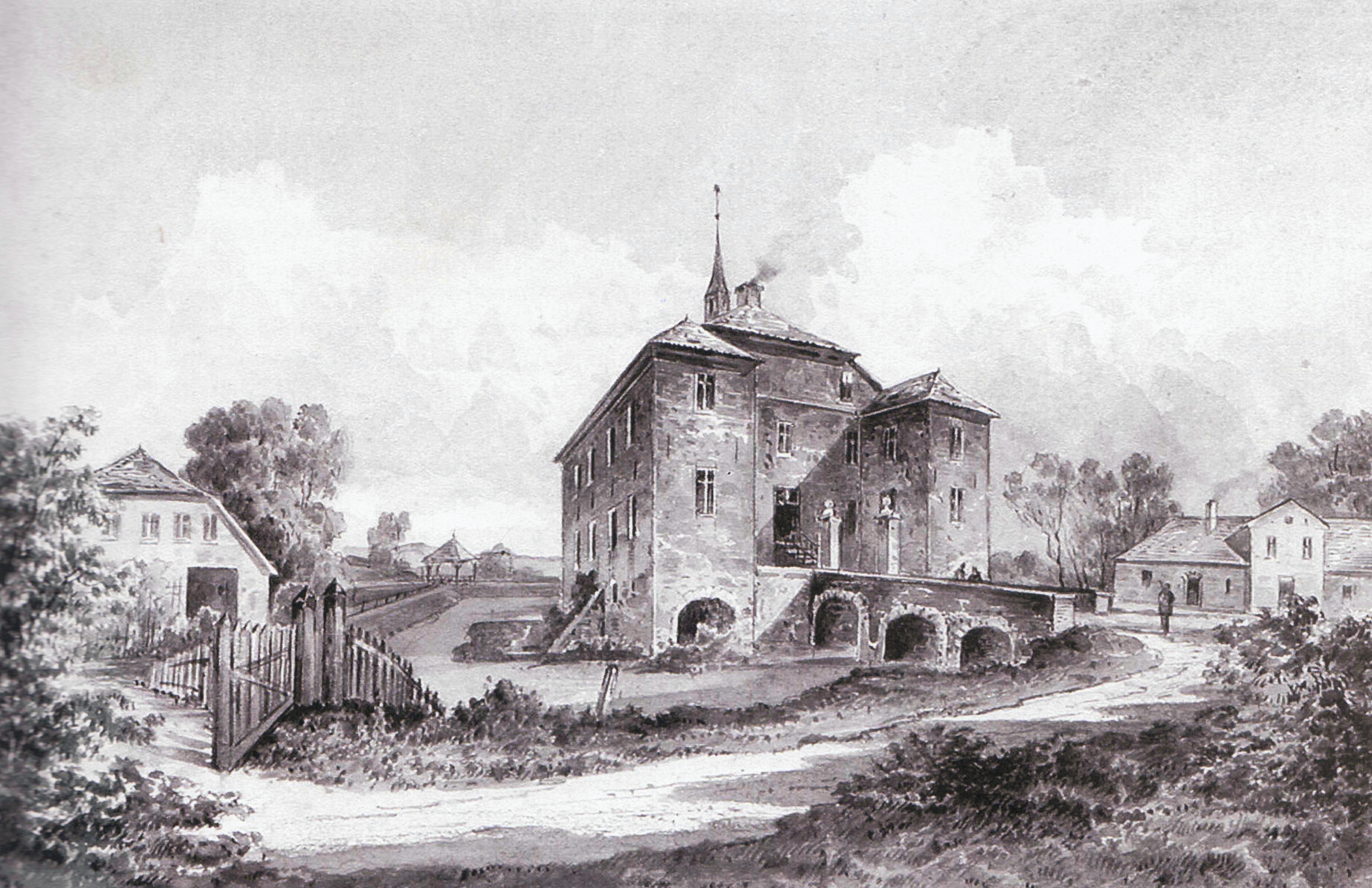 Haus Malenburg in Dorsten um 1880, Ansicht von Westen. Aquarell von Friedrich Zeller (1817-1896)